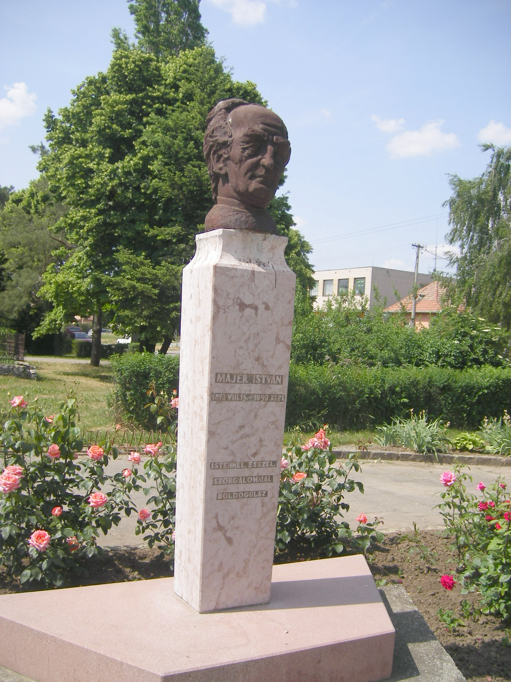 Kürt - Majer István emlékműve